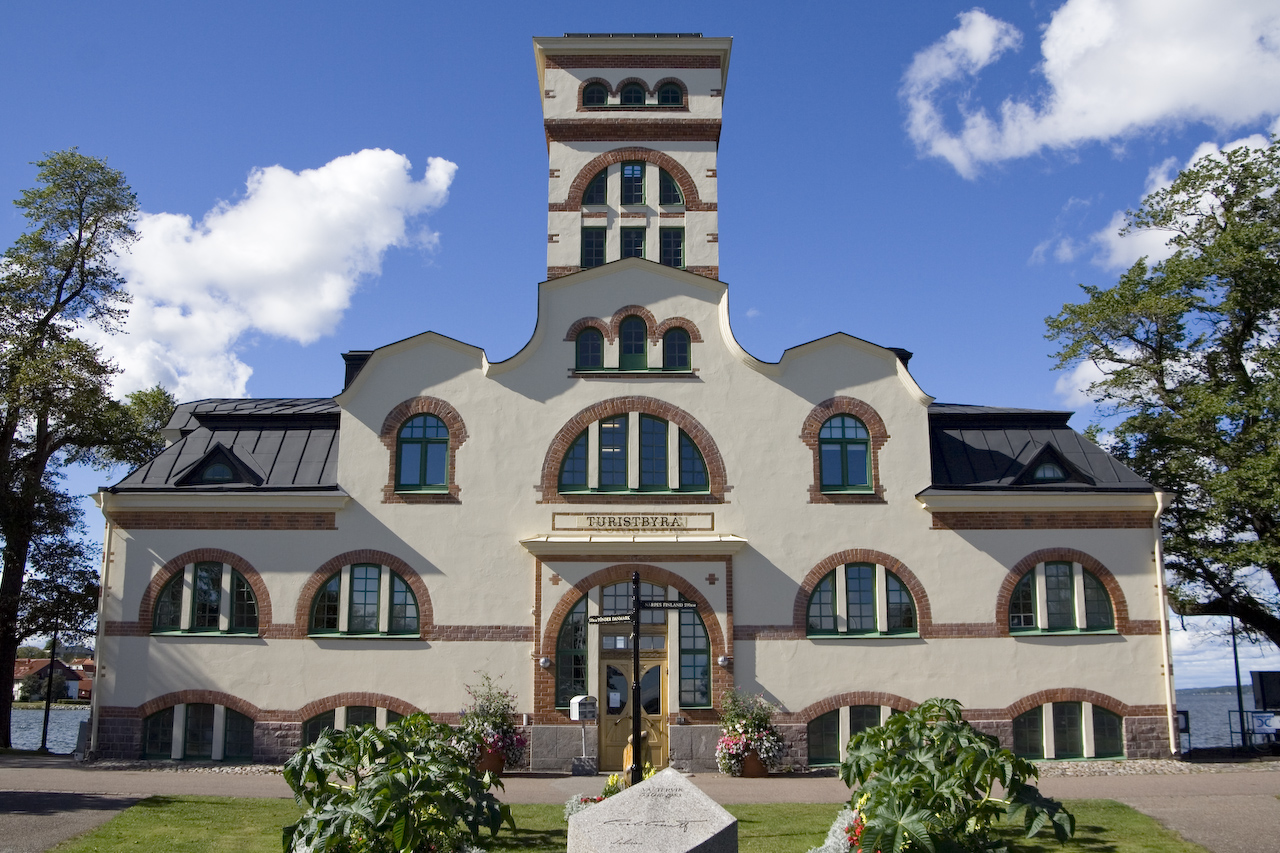 Västerviks turistbyrå på Strömsholmen